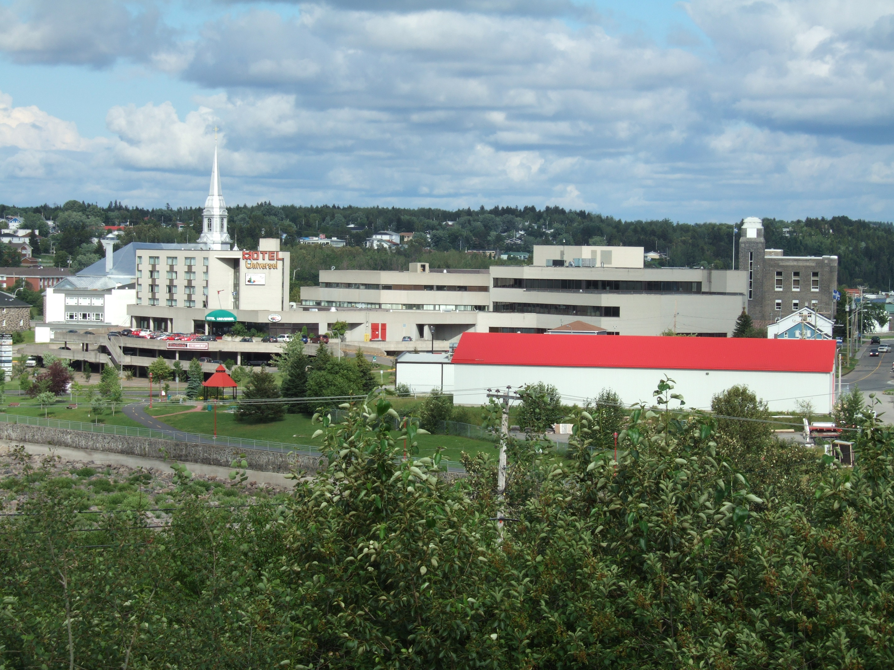 Centre-ville d'Alma